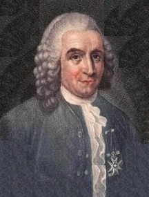 Carl von Linné